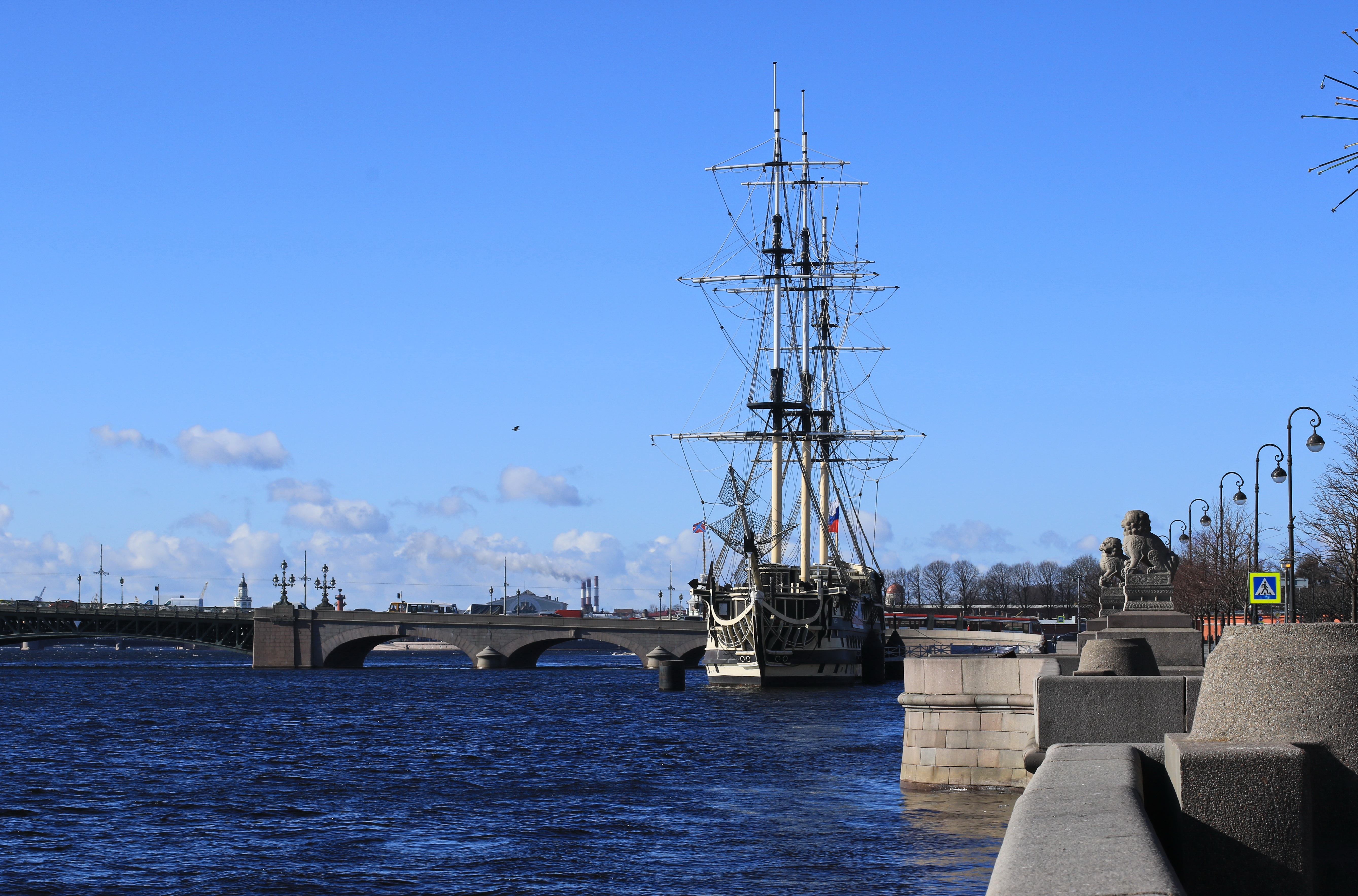 Restaurant- Segelboot Blagodat In Sankt-Petersburg auf der Newa. Russland.